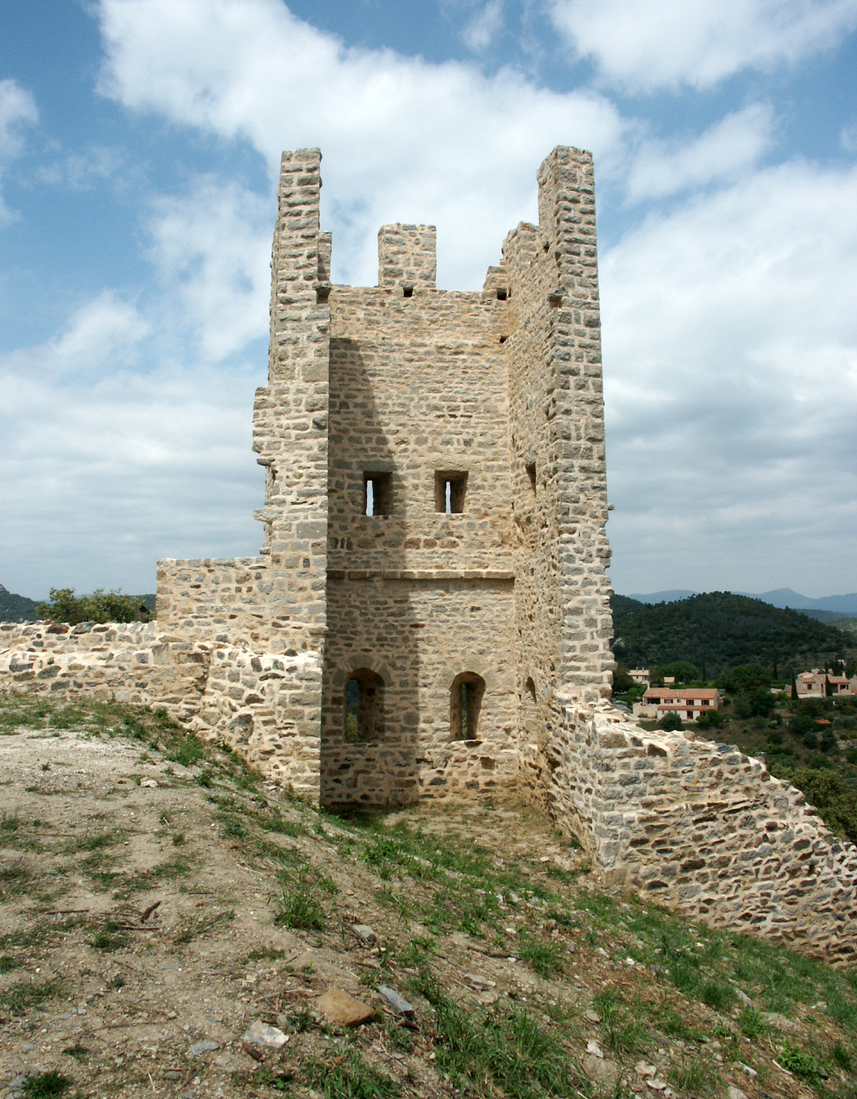 Tour de la première enceinte médiévale de la ville d'Hyères qui ne serait pas antérieure au XIIIe siècle. Cette tour, photographiée intra-muros, est la première, en partant de l'ouest, qui flanquait la courtine venant prendre appui à l'angle nord-est du château proprement dit. Elle est ouverte à la gorge, ce qui empêchait un éventuel assaillant ayant pu franchir la courtine de pouvoir s'en servir pour sa propre défense. De plan quadrangulaire, cette tour a une hauteur maximum de 15 m. On peut restituer trois niveaux dont deux constitués de planchers de bois. Les constructeurs ont jugé bon de réaliser au préalable une sorte de terrasse en terre-plein retenus par des murs de soutènement en moellons de schiste afin de compenser le fort dénivelée du terrain et de limiter ainsi l'importance des élévations. Les trois murs sont pourvus de deux niveaux d'archères.